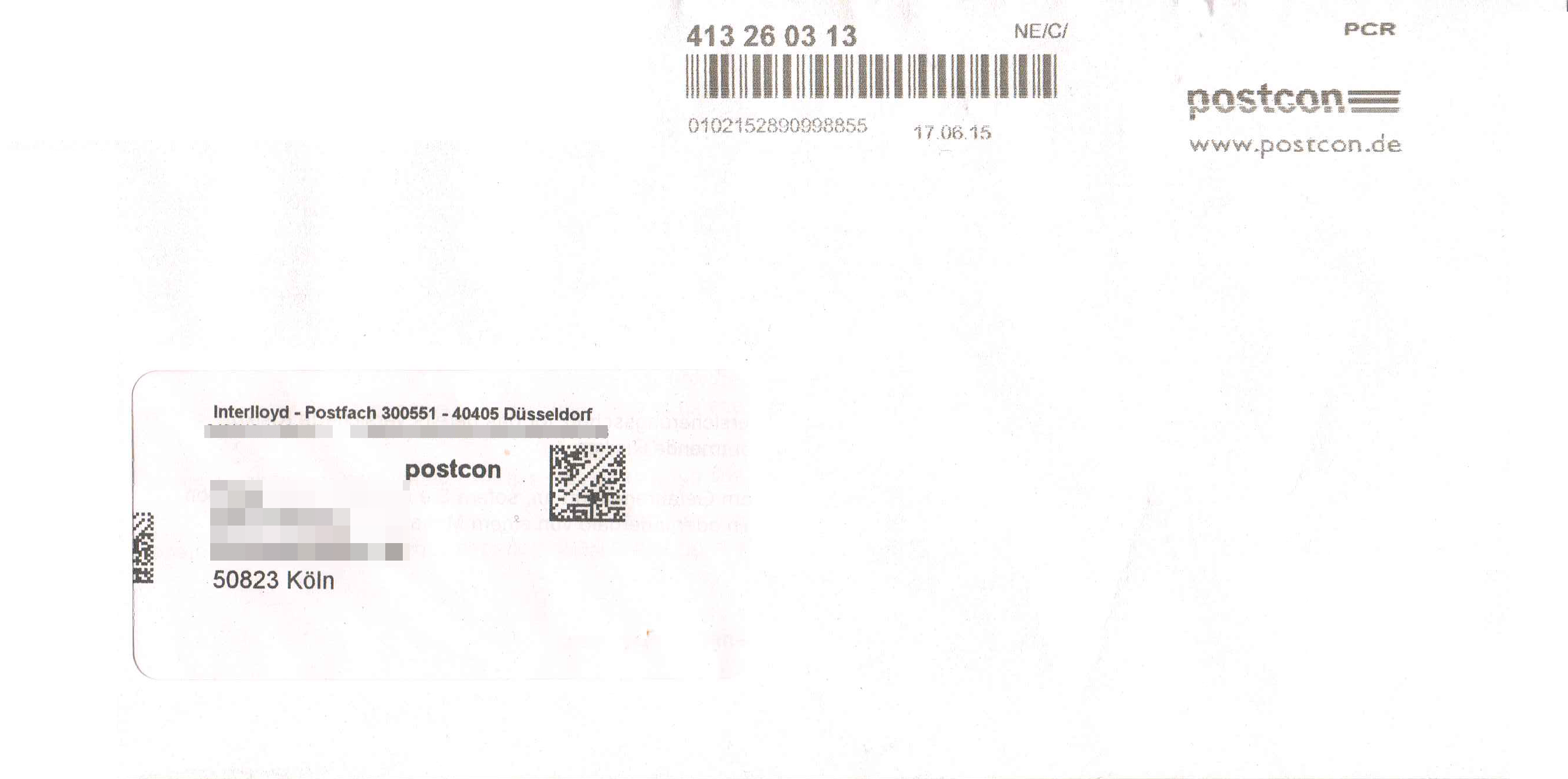 Briefumschlag, innerdeutscher Versand mit Postcon Deutschland